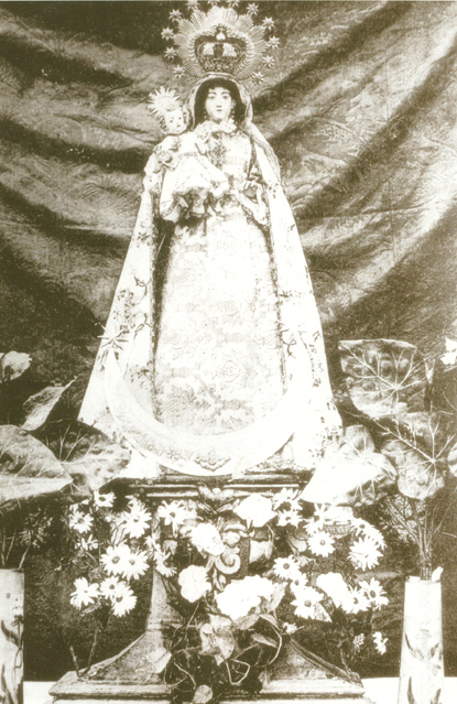 Talla de Nuestra Señora Virgen De Los Remedios de Belmez, Córdoba.